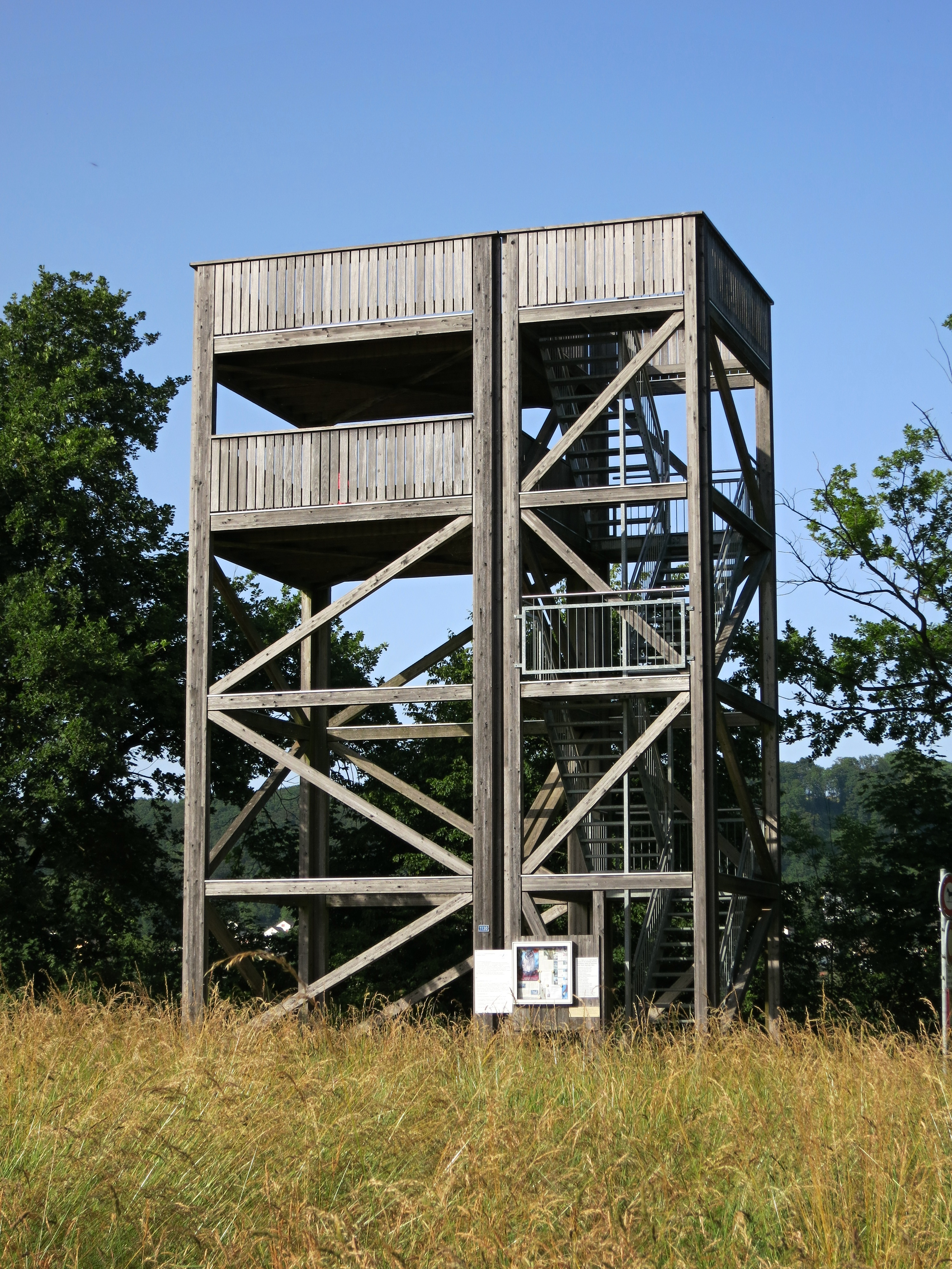 Beobachtungsturm Klingnau